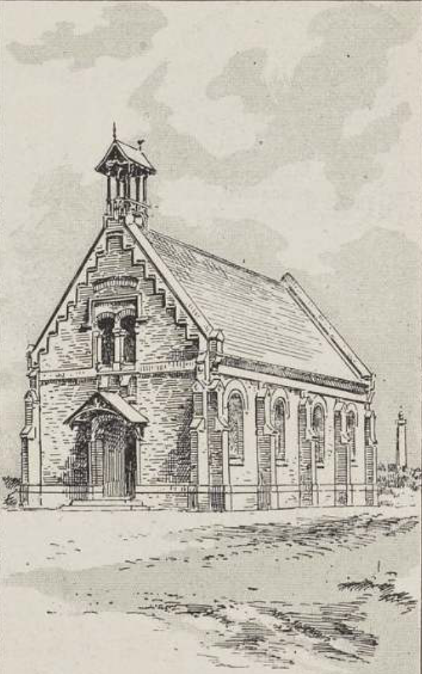 Chapelle Saint-André de Paris-Plage construite en 1886 et détruite en 1927. L'entrée de cette chapelle était située rue de Londres. À son emplacement a été construite la Poste.